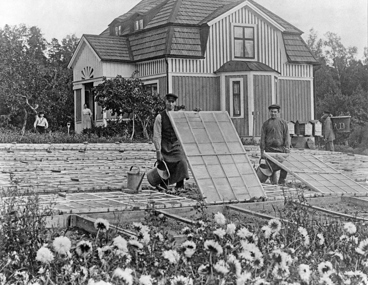 Gula villan vid Görvälns gård i Järfälla 1914-1915, villan även kallad Bläckhornet, Trädgårdsmästarbostaden eller Rättarbostaden. I förgrunden drivbänkar och trädgårdsdrängar. Järfälla kommuns bildarkiv. Bild nr 12724.